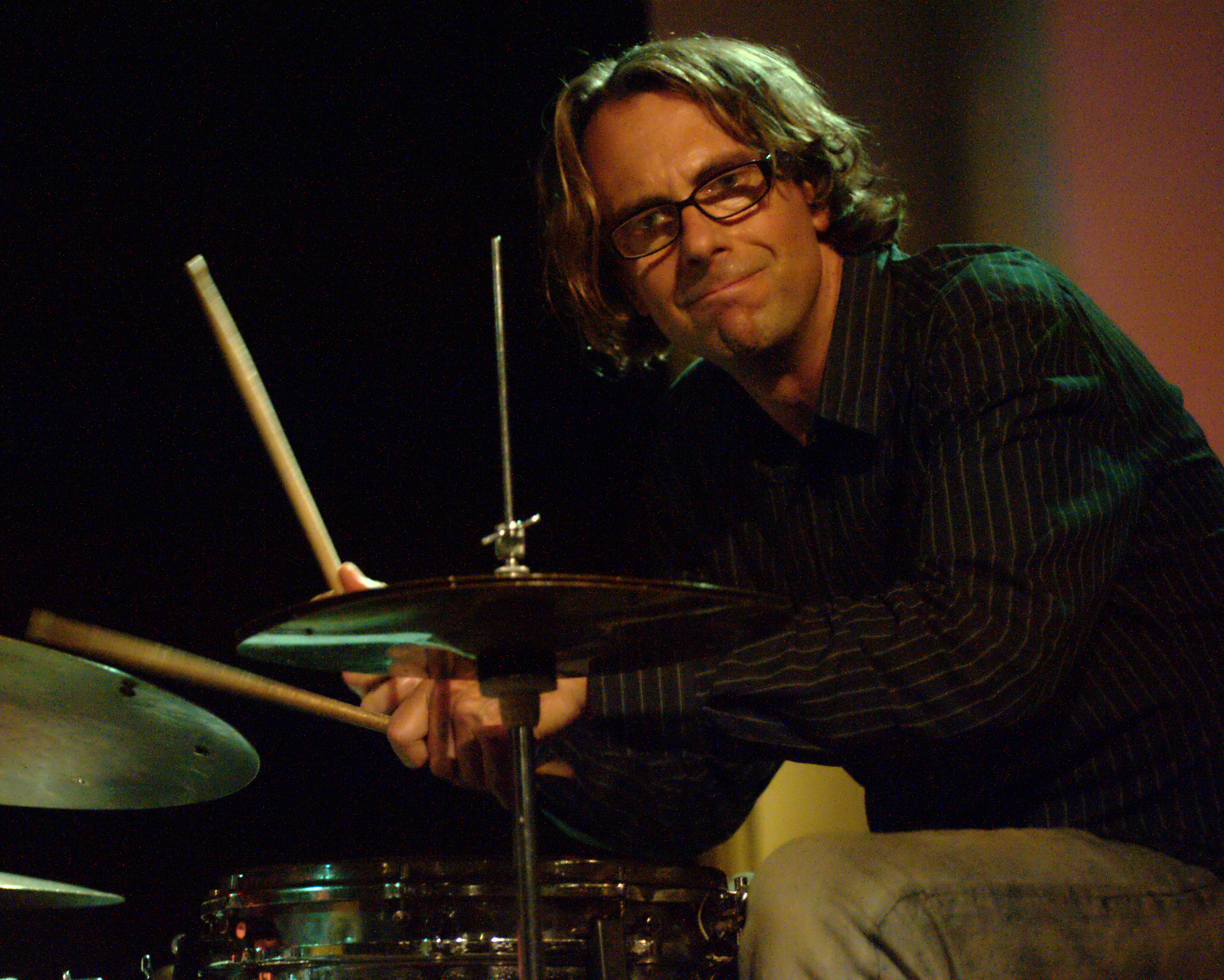 John Schröder in einem Konzert mit Christopher Dell in der Bessunger Knabenschule in Darmstadt am 30.09.2016 anlässlich des Hessischen Jazzpodiums 2016